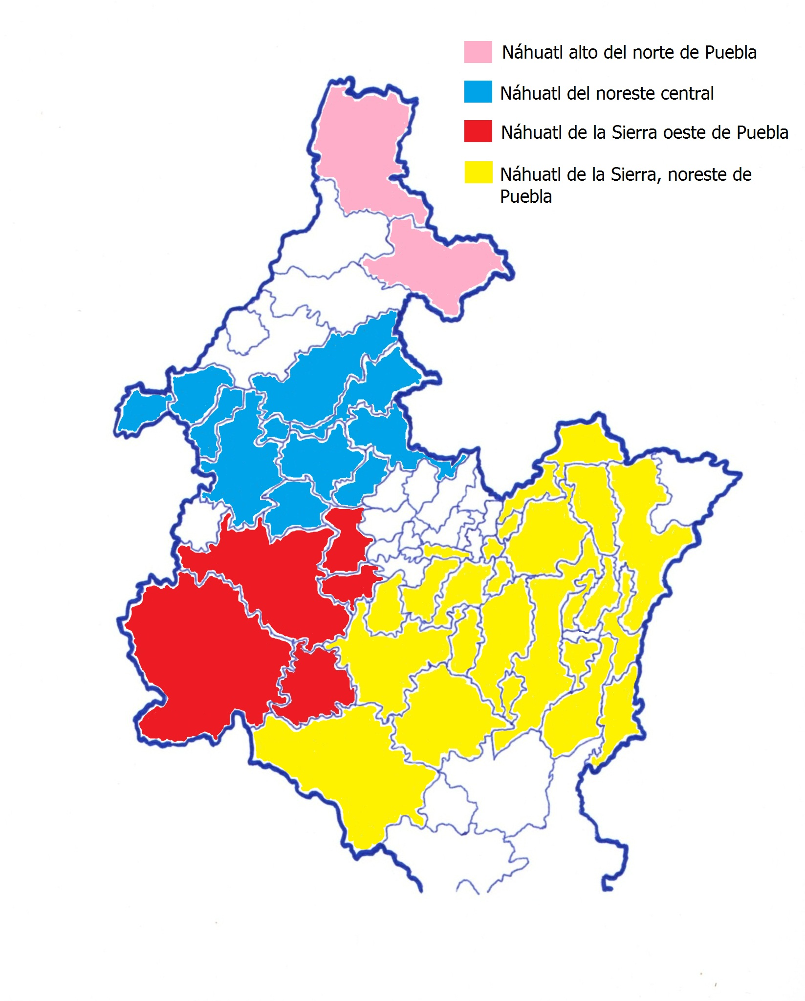 Mapa del norte de Puebla donde se muestran las cuatro variantes más representativas de la zona